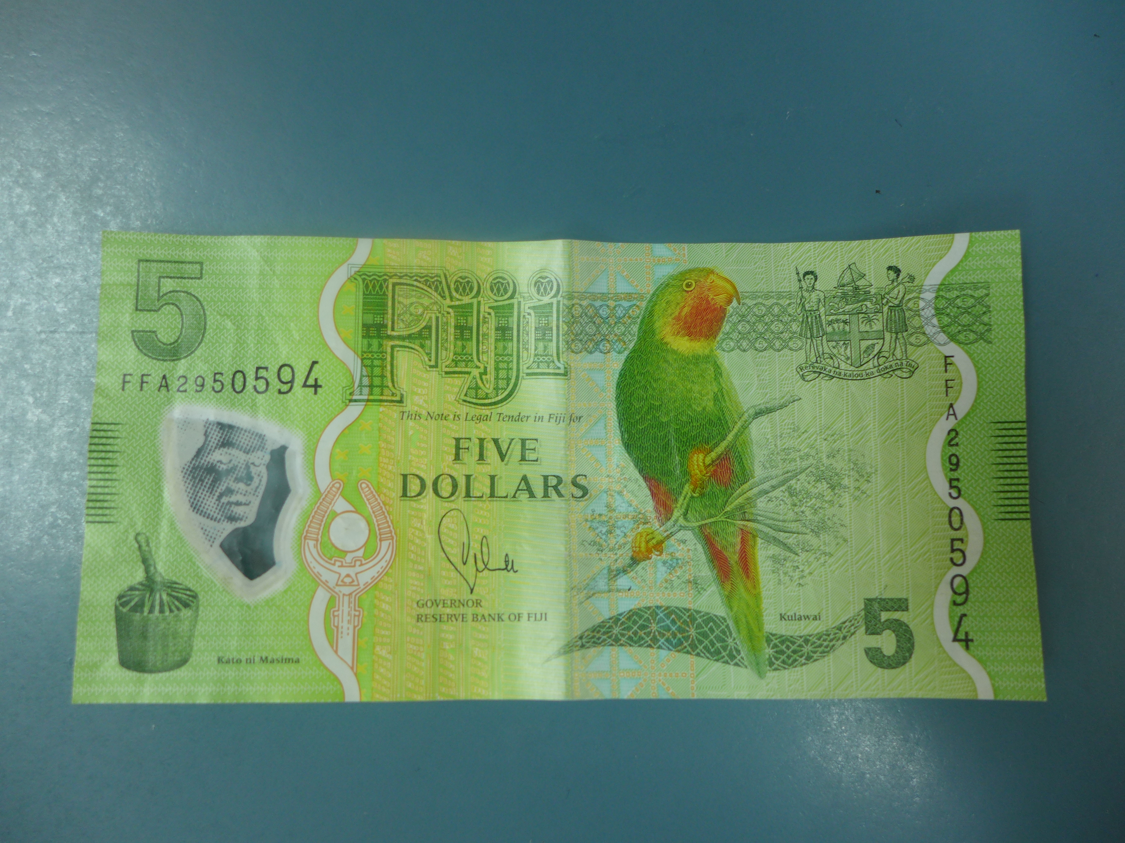 Banknote